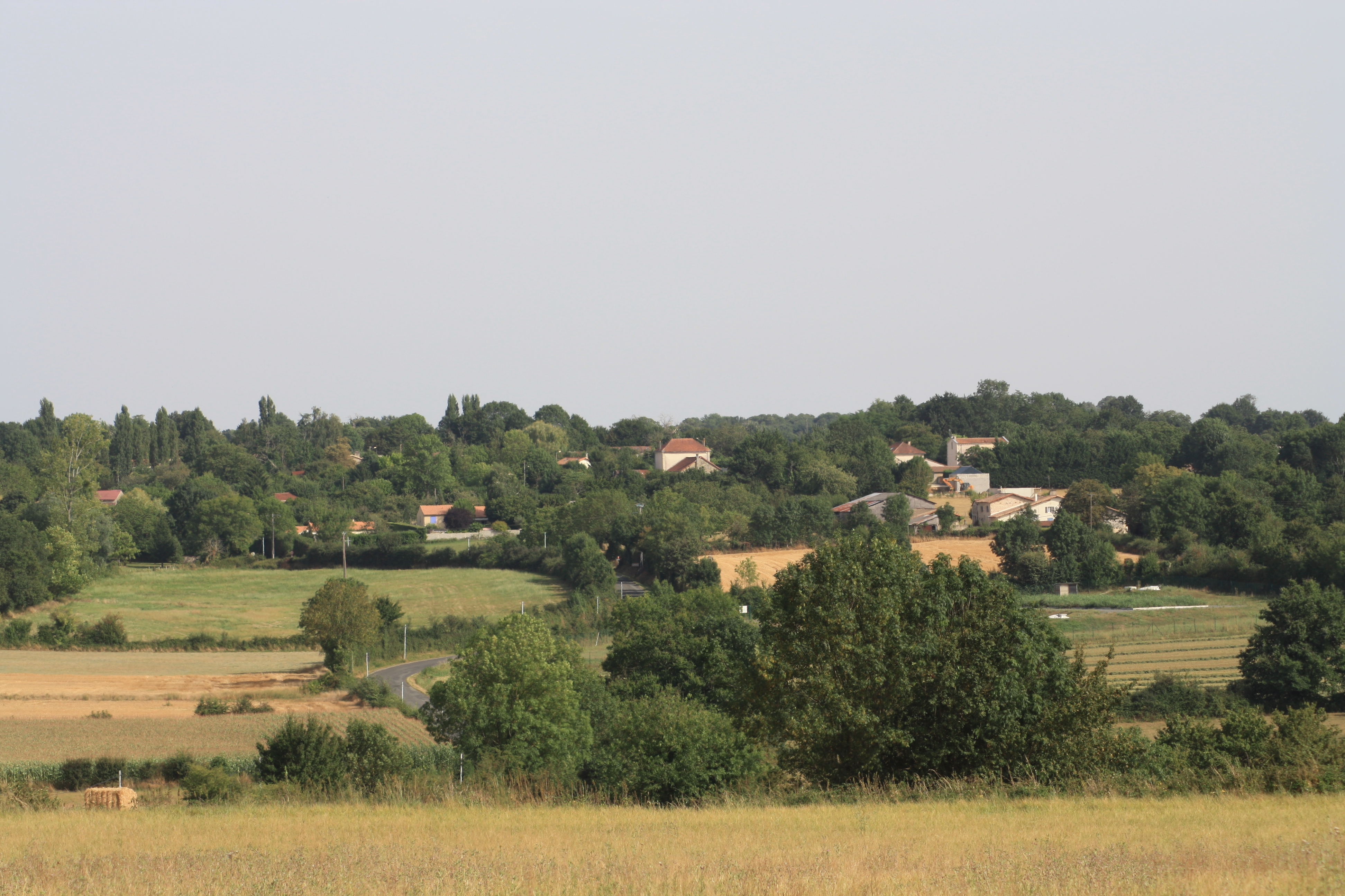 Vue du bourg de Prailles